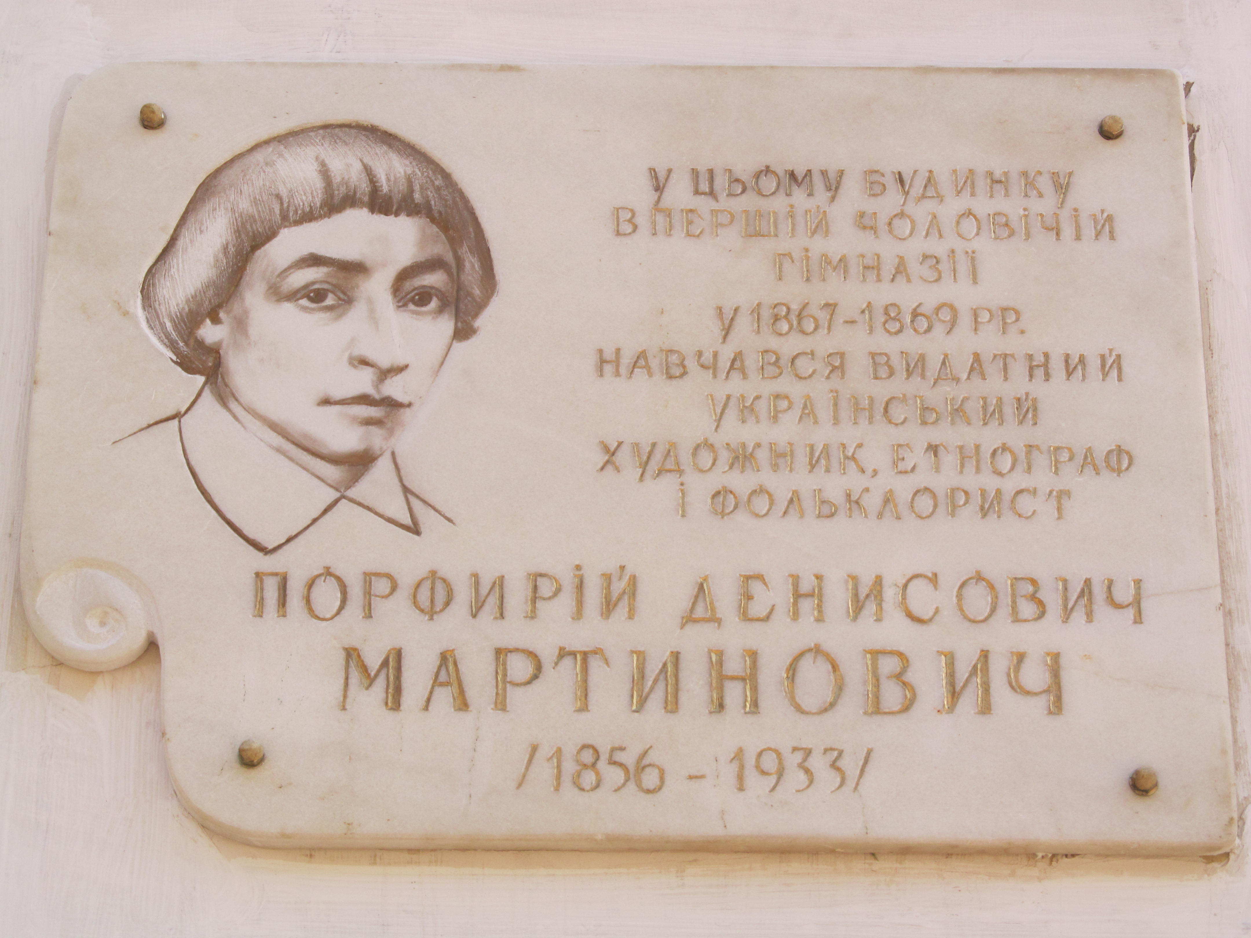 Мемориальна дошка П.Д. Мартиновичу у Харкові